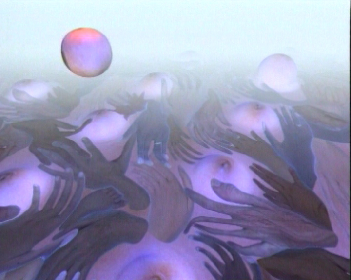 Image extraite de Limbes, film d'animation de Bériou.